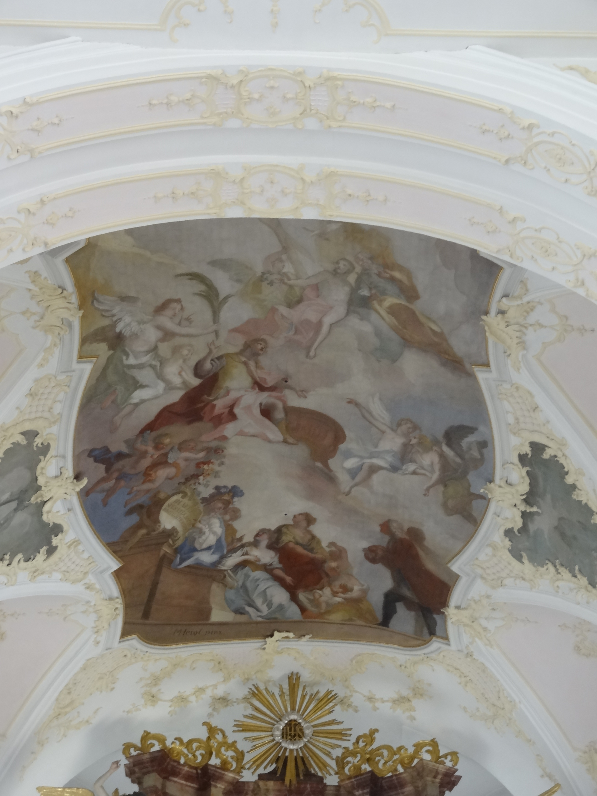 Fresko im Chorraum der Pfarrkirche St. Vitus in Offenstetten (Stadt Abensberg, Landkreis Kelheim)